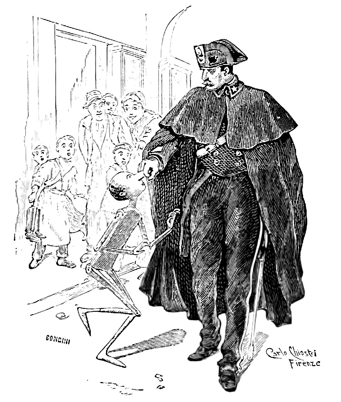 Illustrations from "Le avventure di Pinocchio, storia di un burattino", Carlo Collodi, Bemporad & figlio, Firenze 1902 (Drawings and engravings by Carlo Chiostri, and A. Bongini)